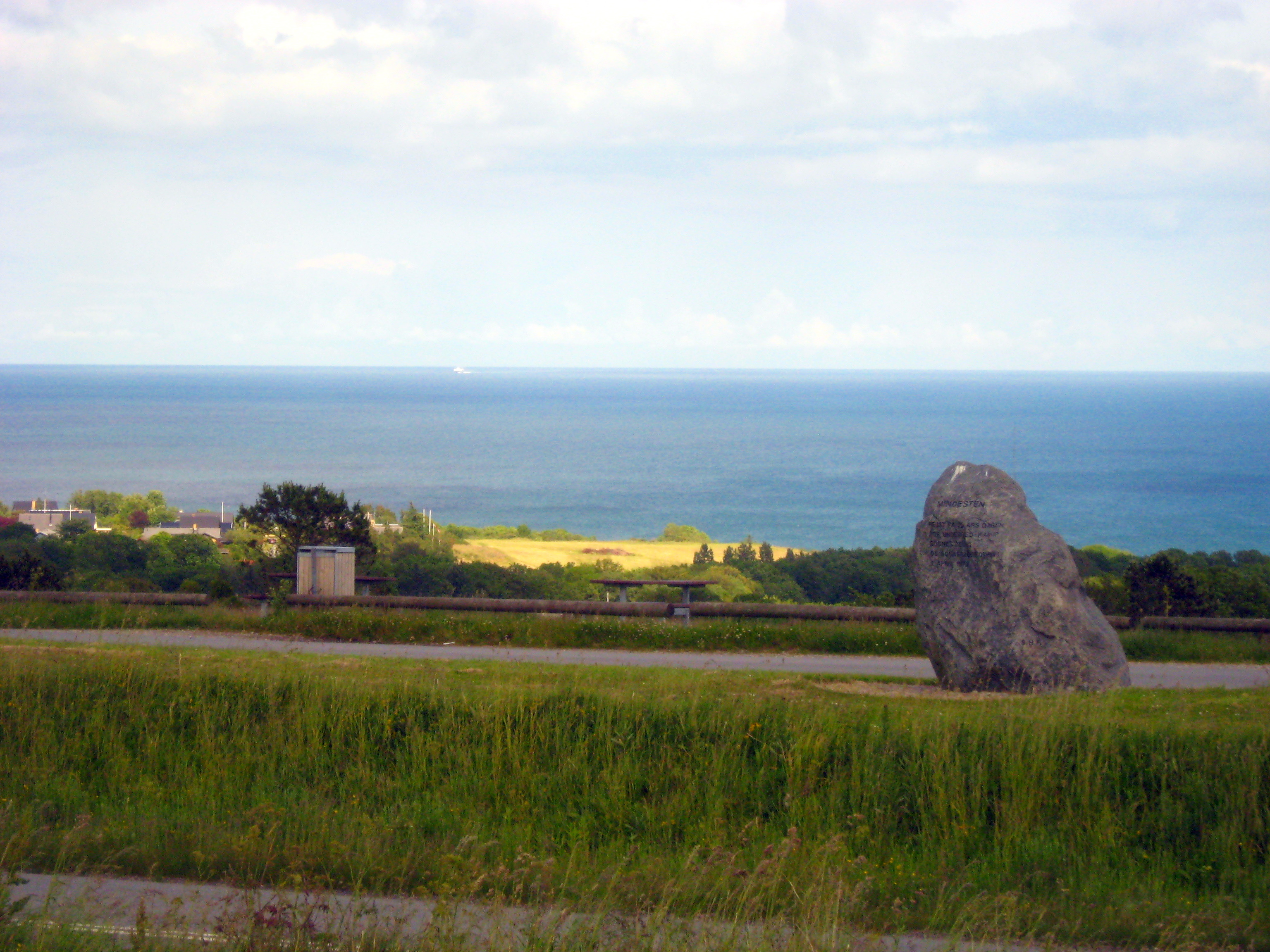 Danske højdepunkter: Øksnebjerg ved Frederikshavn, 95 m